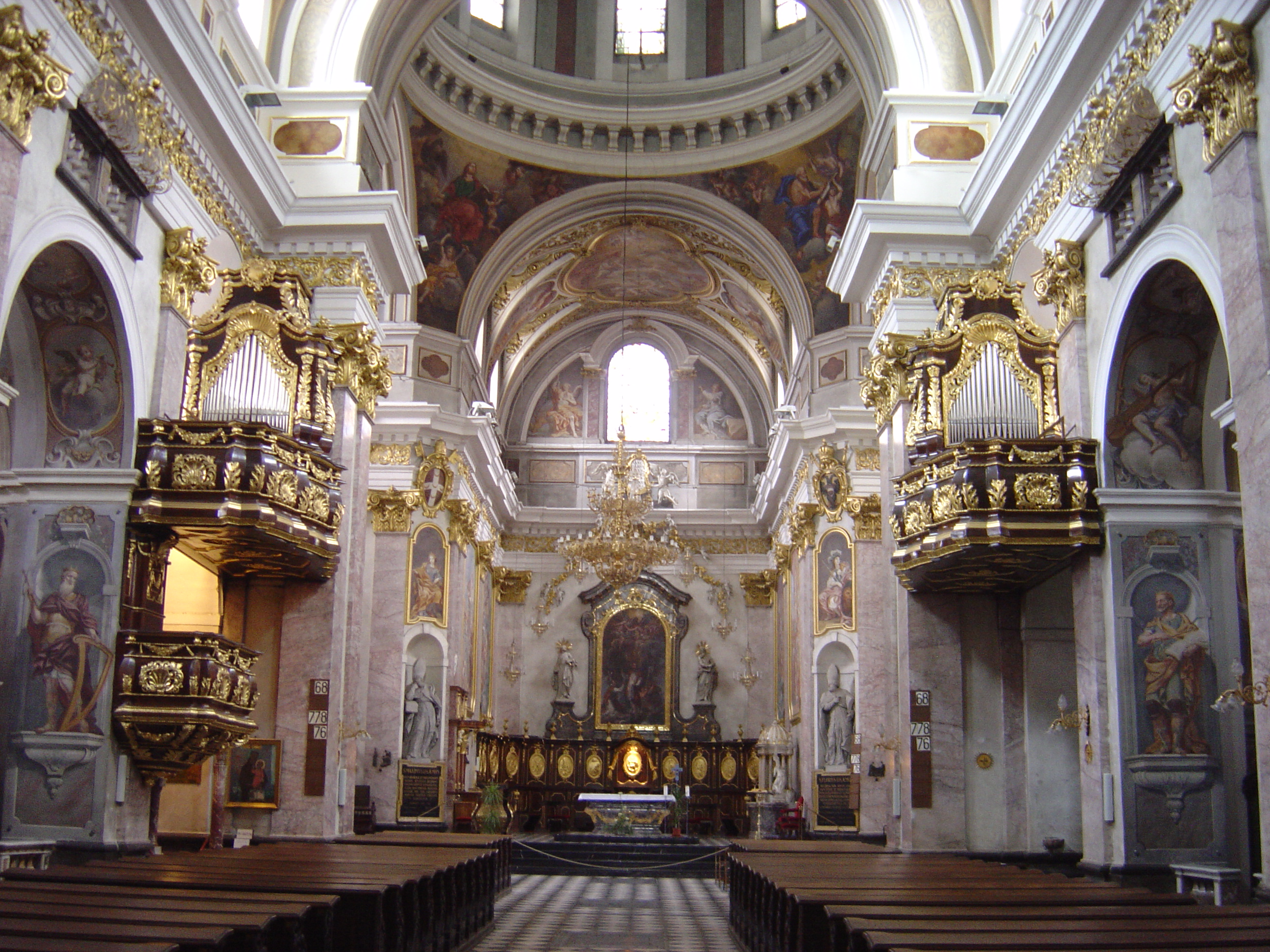 Ljubljana, Slovenia